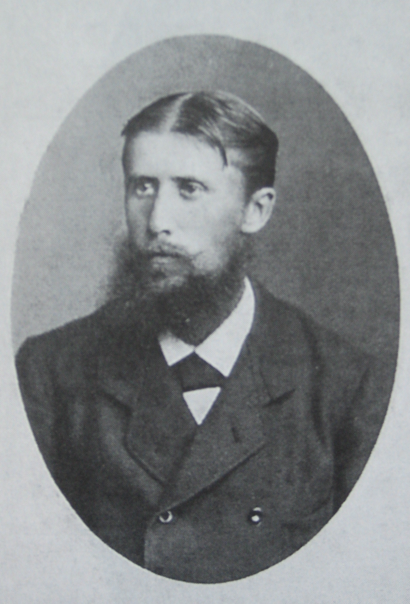 Bernhard Diethelm Spyri, 1855 - 1884, einziger Sohn von Johanna Spyri